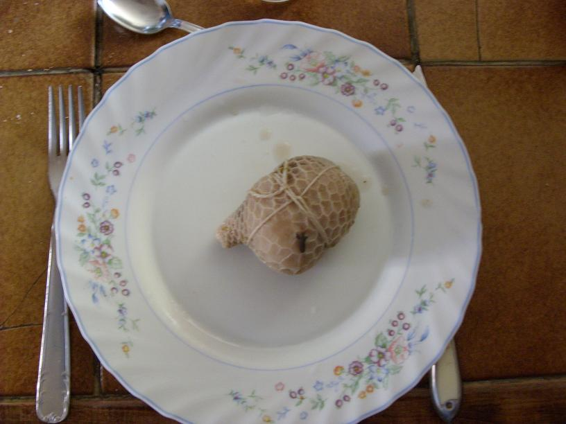 Trenels